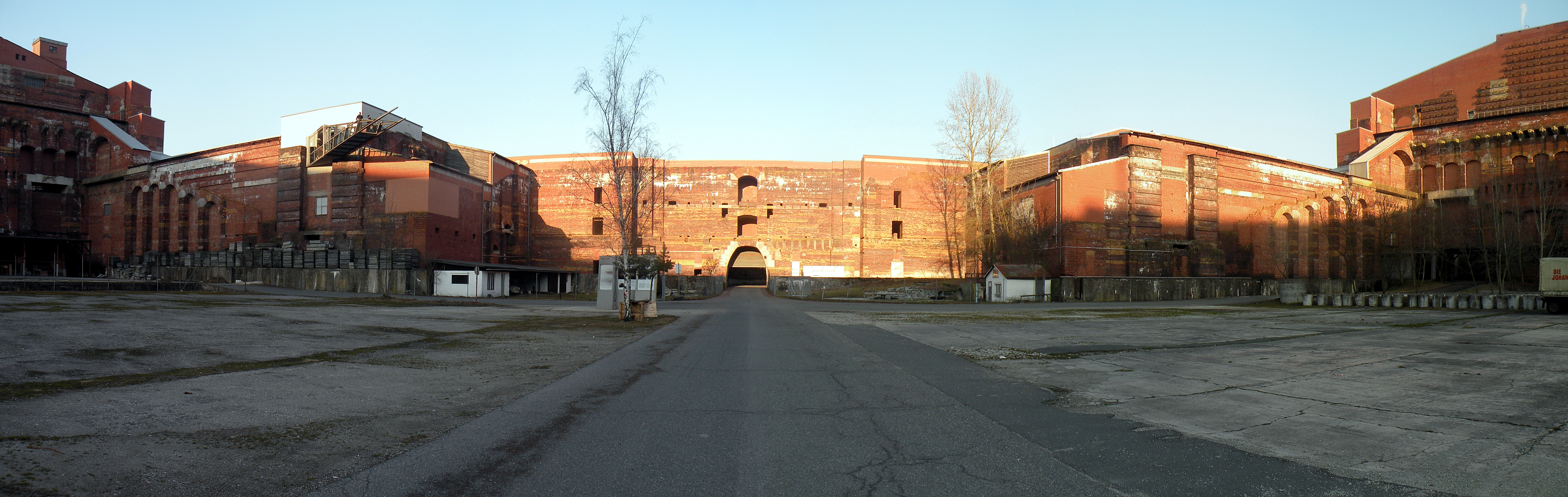 Нюрнберг.Дворец_съездов_изнутри._Вид_на_NO